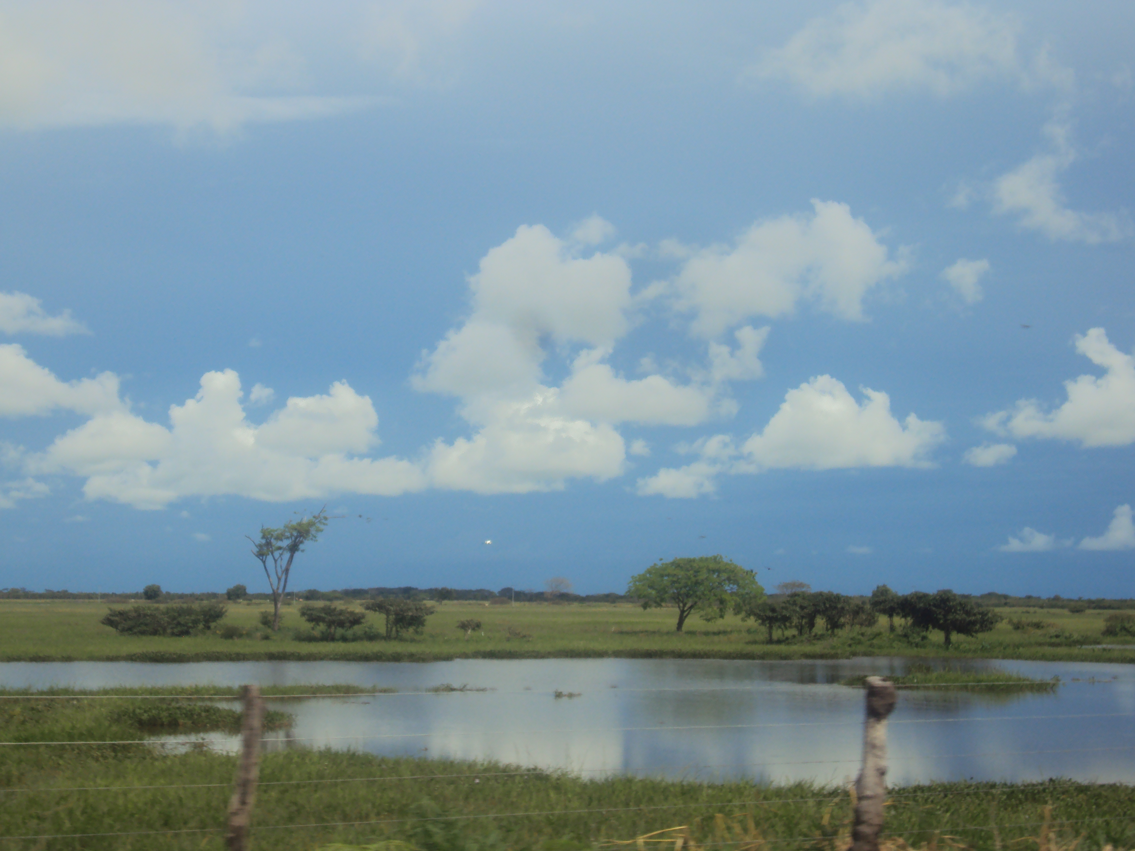 Parque Nacional Santos Luzardo